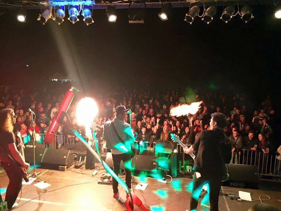 Live show, 2015